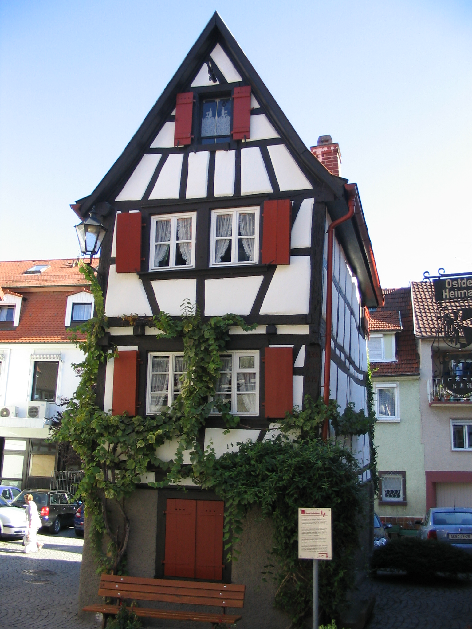 Description in de wikipedia Beschreibung: Haus Kickelhain in Mosbach Quelle: eigenes Bild Fotograf: AlterVista Datum: September 2003 Lizenzstatus: GNU_FDL